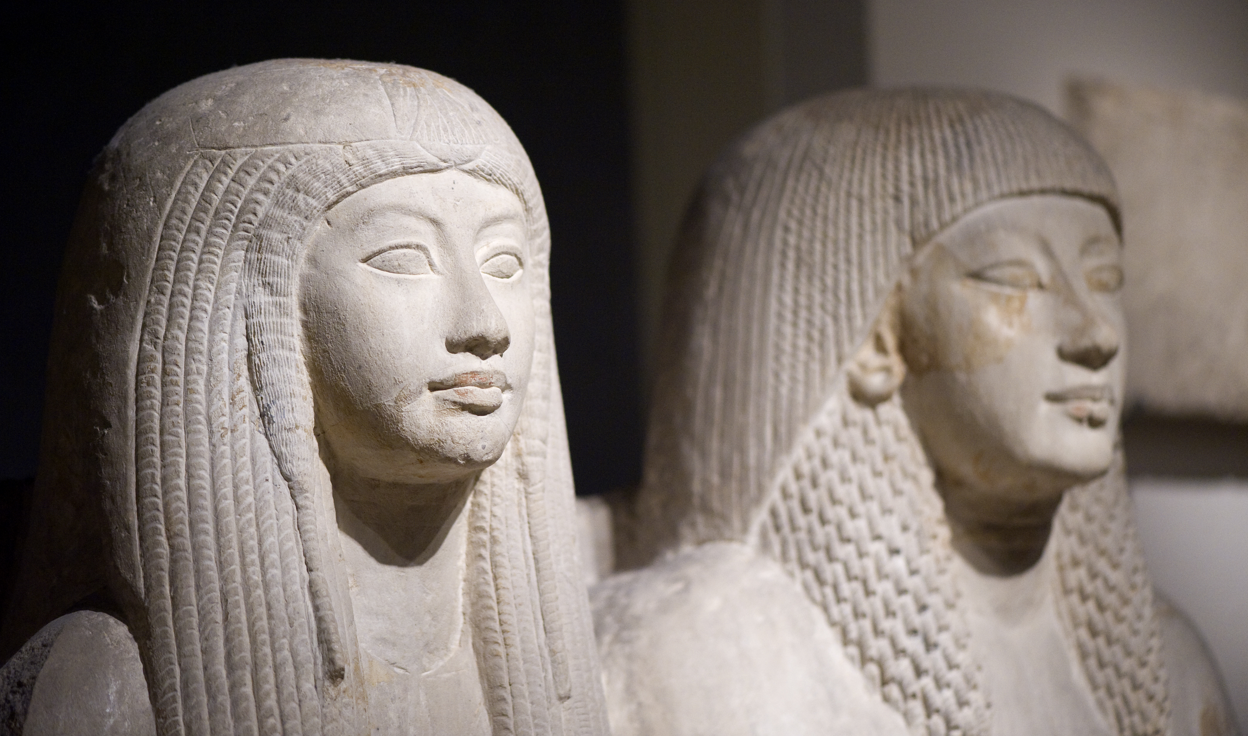 Dubbelbeeld van Maya en Merit Merit en Maya (RMO)